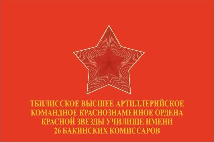 Знамя Тбилисского высшего артиллерийского командного Краснознаменного Ордена Красной Звезды училища имени 26 Бакинских комиссаров (ТВАКУ)